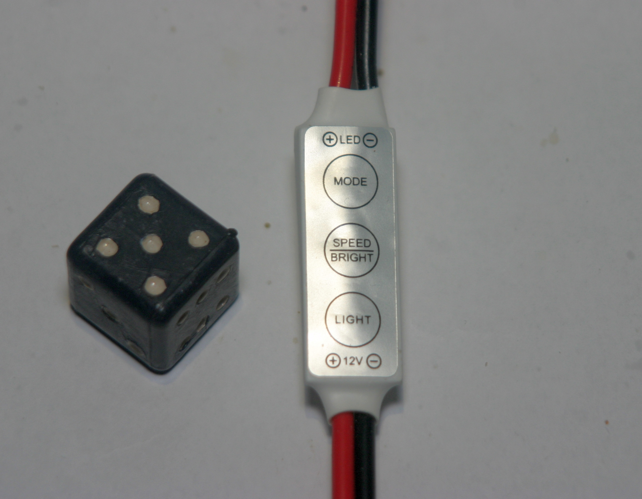 Миниатюрный диммер с кнопочным управлением яркостью и режимами работы и запоминанием установок после отключения питания.